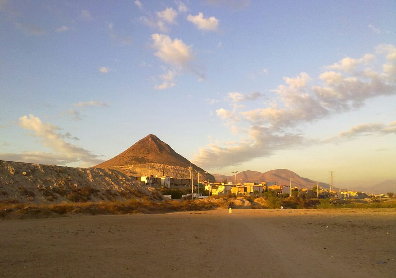 cerro de las abejas Tijuana,México